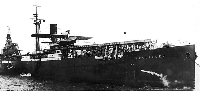 Das Katapultschiff WESTFALEN der DLH